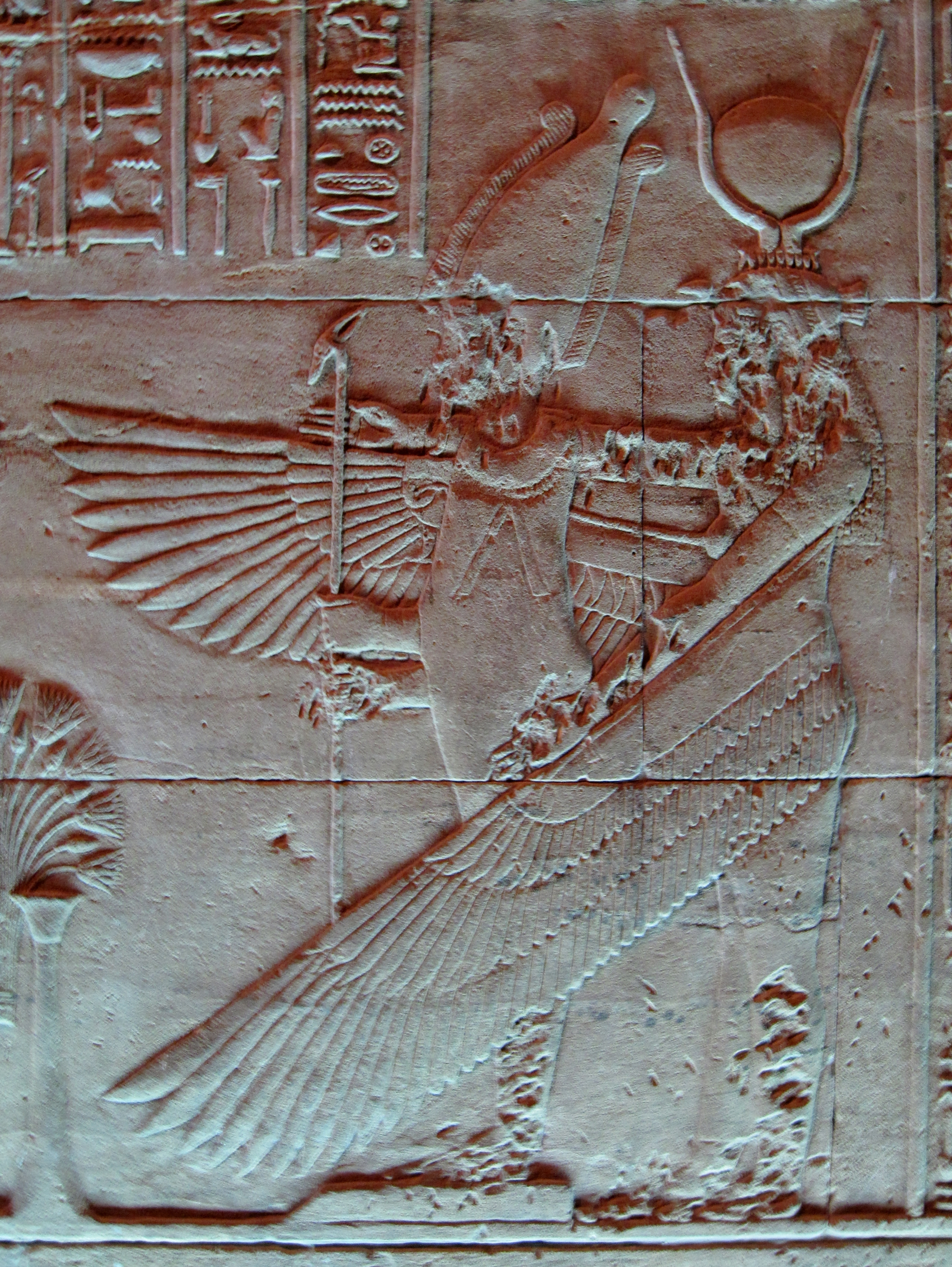 Relief im Isis-Tempel von Philae auf der Insel Agilkia, Ägypten